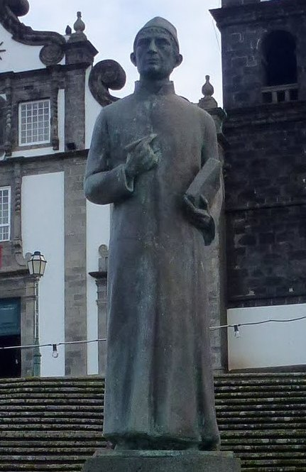 Ribeira Grande, São Miguel Island, Azores